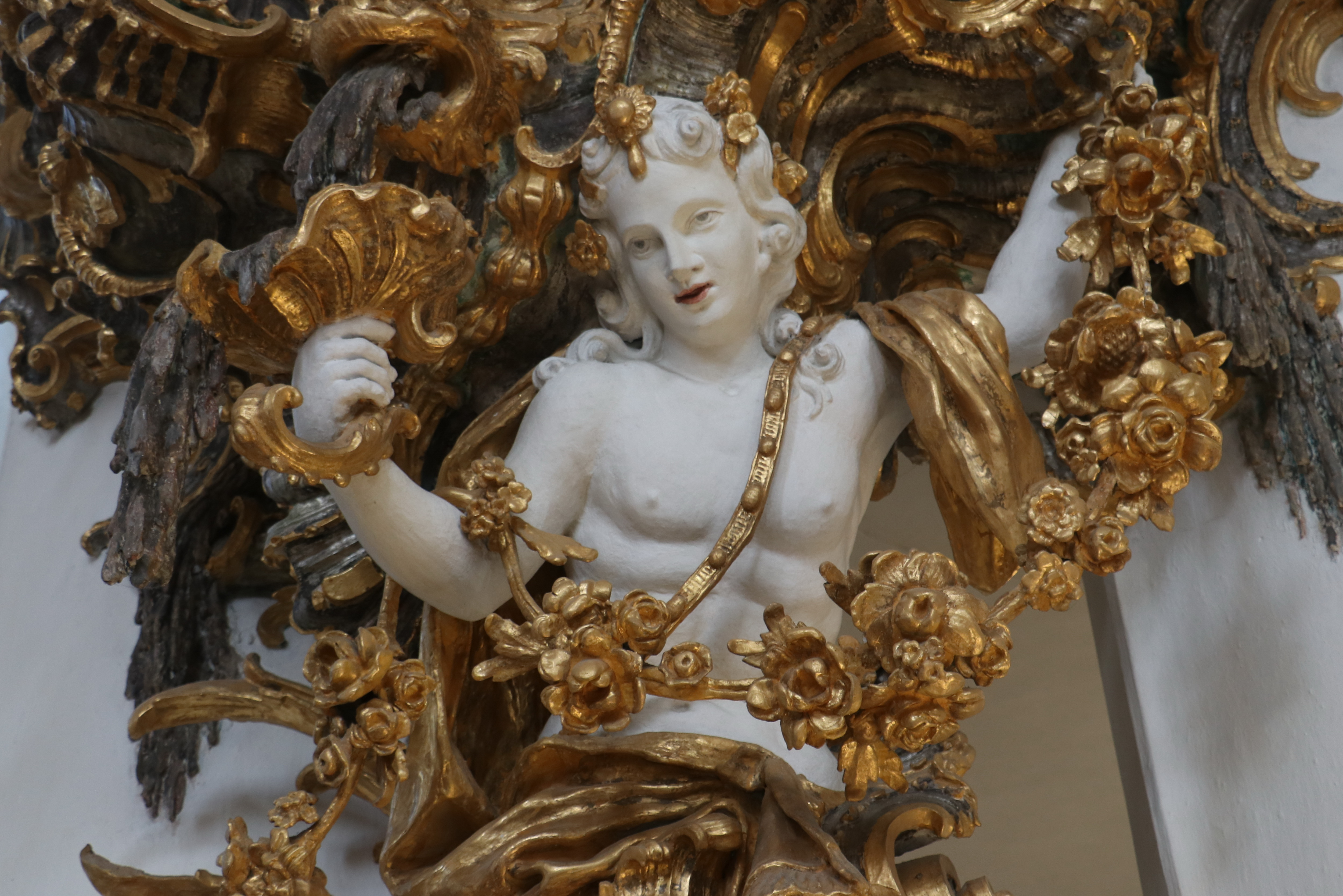 Wies church (Wieskirche), Germany - Pulpit (Detail)